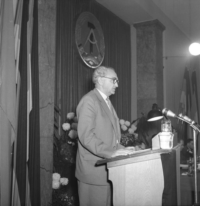 Zentralbild/Zühlsdorf 10.10.1958 Konkretes Angebot der DDR zur Linderung der Krisen-Notlage der westdeutschen Werktätigen. - Stark beobachtete konkrete Vorschläge zu dem Angebot Walter Ulbrichts auf dem III. Kongress der Nationalen Front an Westdeutschland über die zusätzliche Abnahme an Walzmaterial und vier Millionen Tonnen Steinkohle unterbreitete der Stellvertreter des Vorsitzenden des Ministerrats der DDR und Minister für Außenhandel und Innerdeutschen Handel, Heinrich Rau, am 10.10.1958 in Berlin. Vor zahlreichen Journalisten aus dem Ausland, aus Westdeutschland und der DDR erklärte er auf einer Pressekonferenz des Presseamtes beim Ministerpräsidenten die Bereitschaft der Regierung der DDR, darüber ein Sonderabkommen abzuschließen. (Näheres siehe ADN-Meldungen vom 10.10.1958) UBz: Der Stellvertreter des Vorsitzenden des Ministerrates und Minister für Außenhandel und Innerdeutschen Handel, Heinrich Rau, bei seinen Ausführungen.